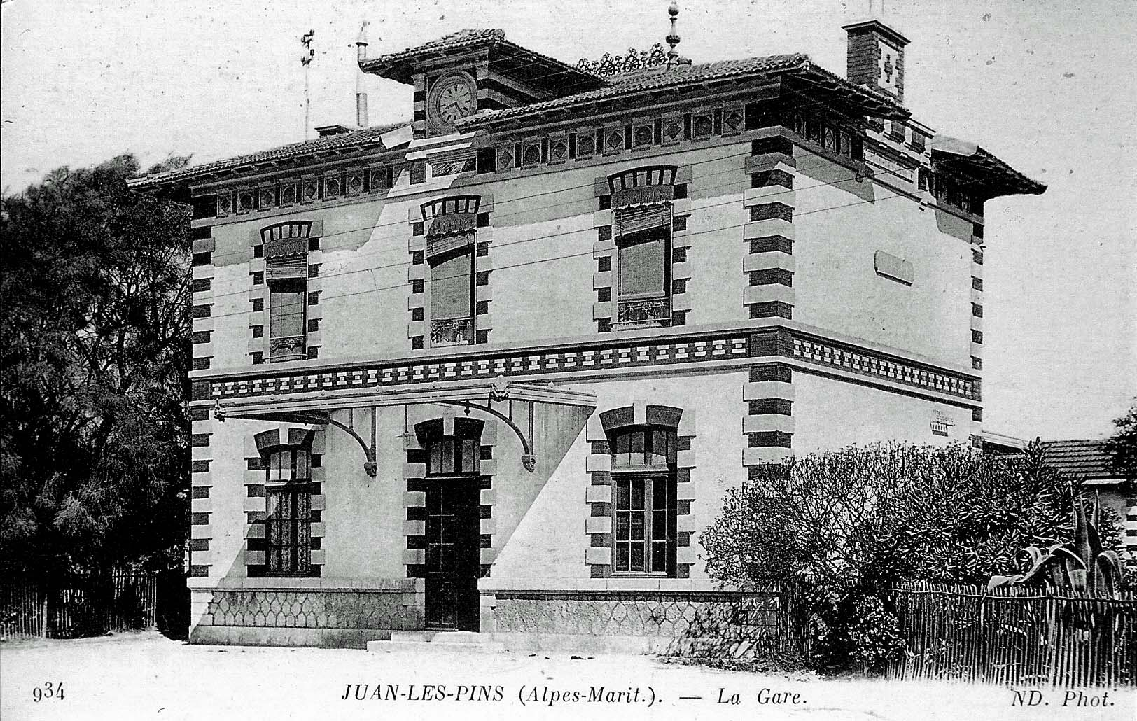 La gare de Juan-les-Pins telle qu'elle était avant les grands travaux de réaménagement.